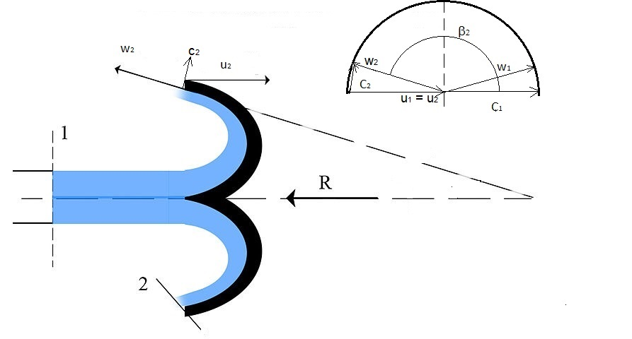 Sketch of velocity vectors on a Pelton turbine. Adaptation of a drawing originally performed by Utente: Raiko